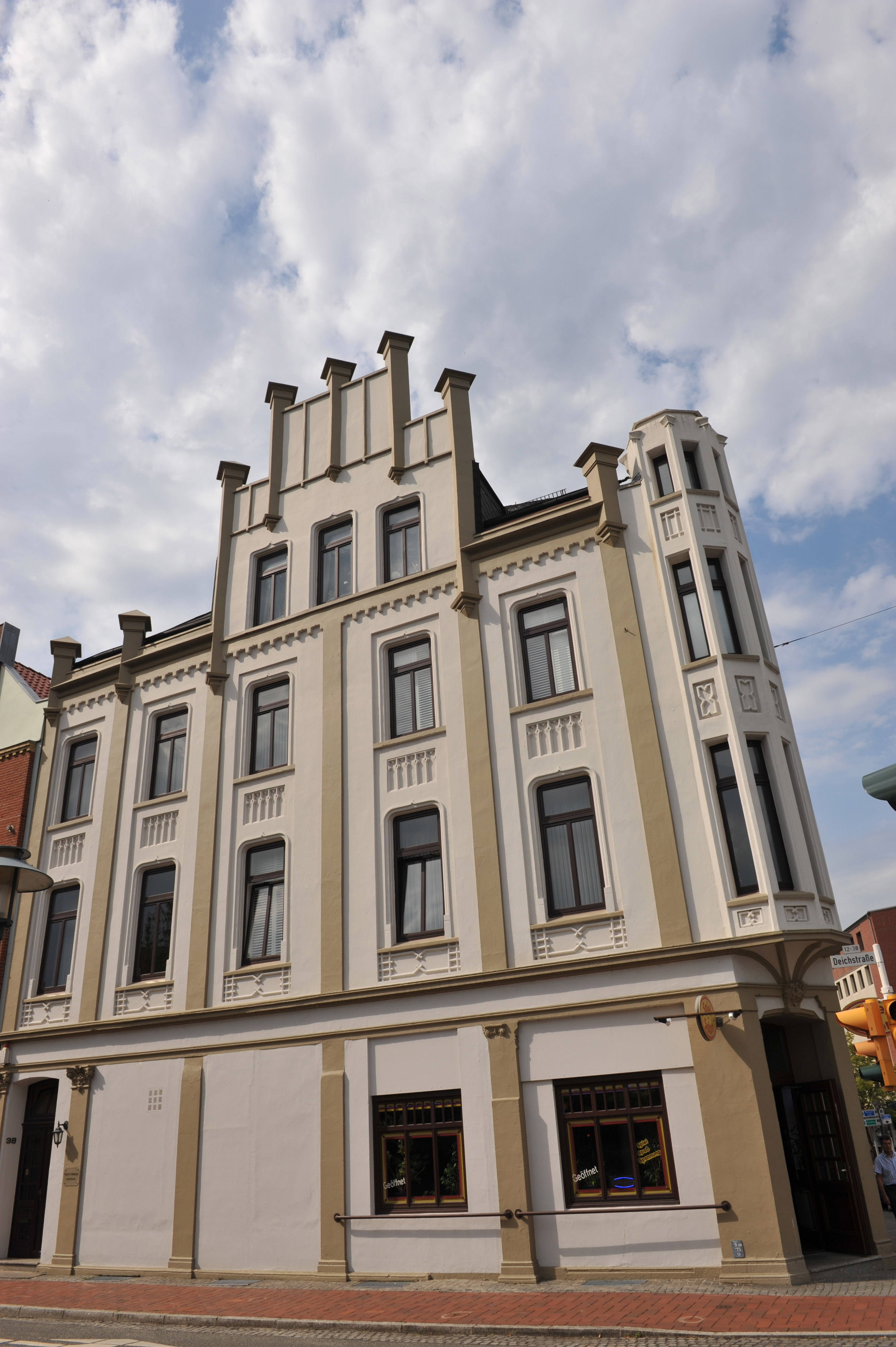 Historical building in Bremerhaven, northern Germany Wohn- und Geschäftshaus, Deichstraße 38, 1869 Das abgebildete Objekt ist ein geschütztes Kulturdenkmal in der Freien Hansestadt Bremen, mit der Nr. 1534 beim Landesamt für Denkmalpflege registriert.